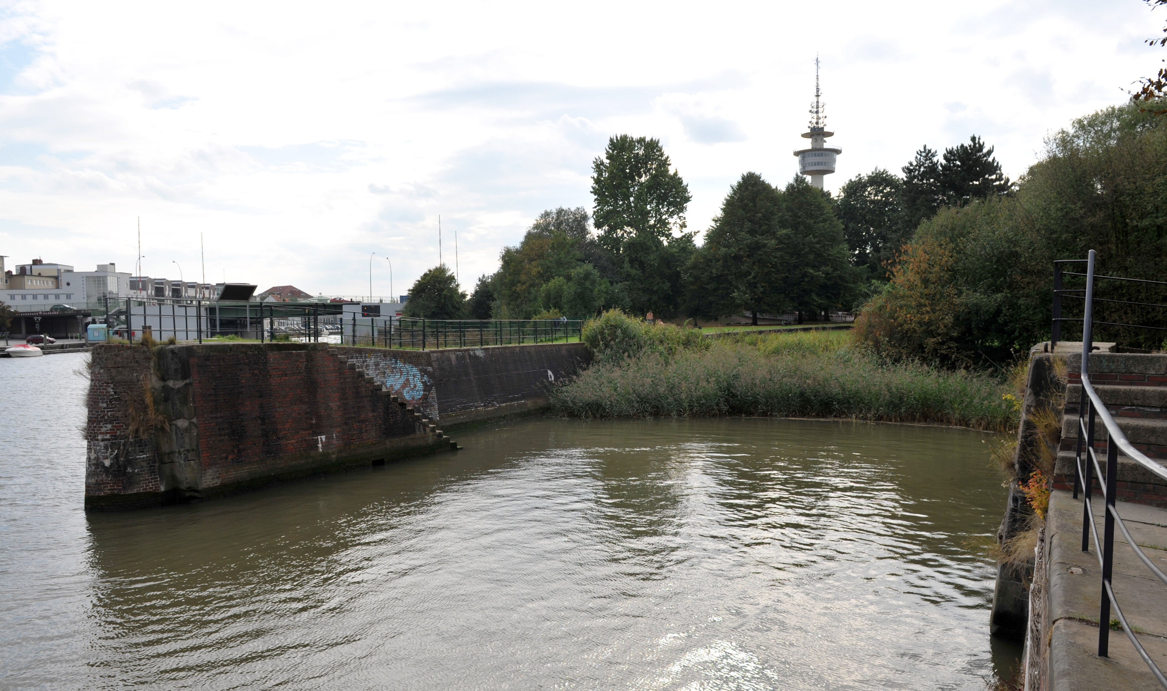 Historical building in Bremerhaven, northern Germany Wenke Dock, Deichstraße, 1860 (1978) Das abgebildete Objekt ist ein geschütztes Kulturdenkmal in der Freien Hansestadt Bremen, mit der Nr. 1533 beim Landesamt für Denkmalpflege registriert.